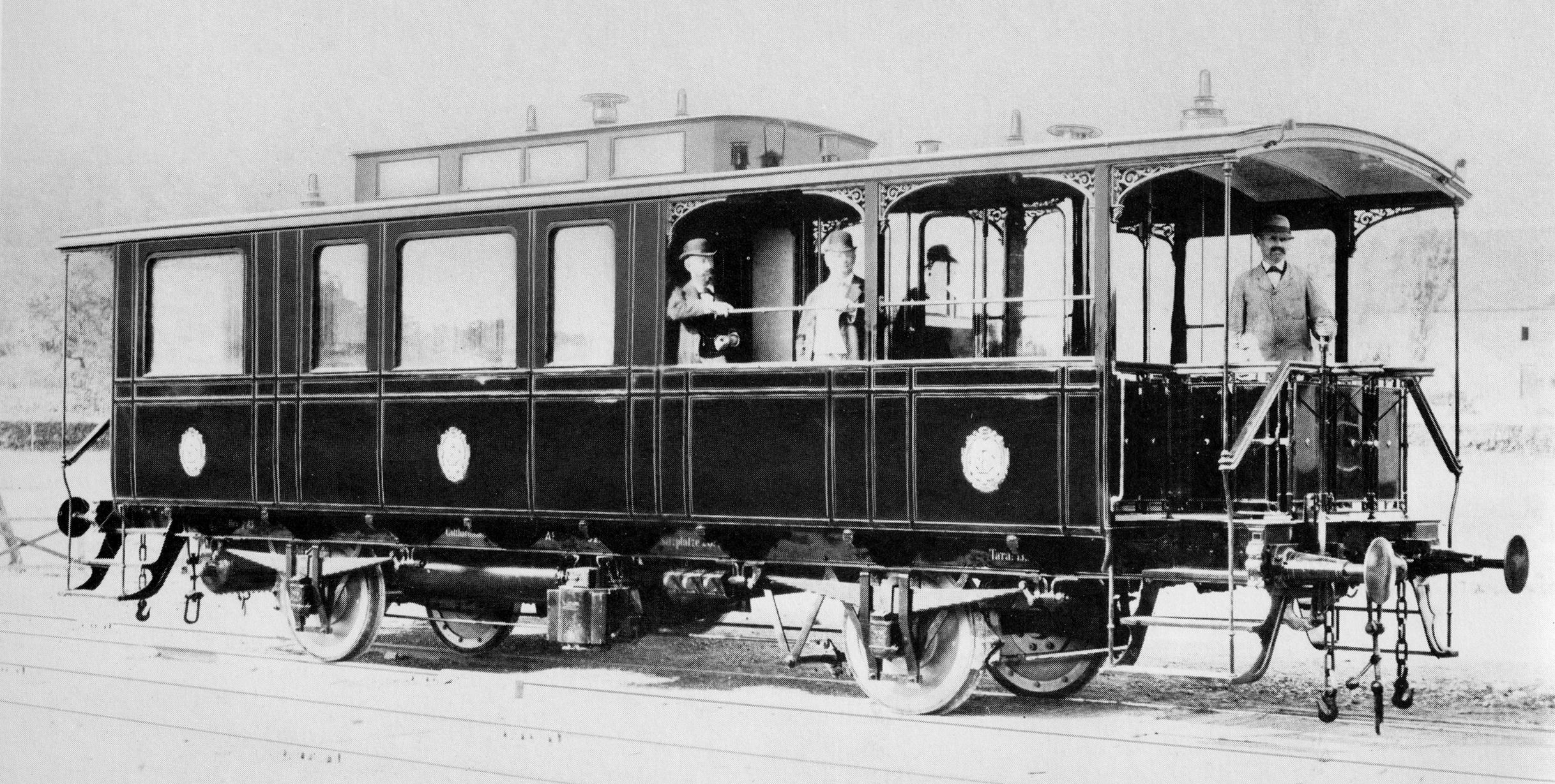 Salonwagen As 51 und 52 der Gotthardbahn (GB), erbaut 1882/83 von der Schweizerischen Industrie-Gesellschaft (SIG), Neuhausen am Rheinfall. Sie wiesen 18 Sitzplätze auf, 6 im mittleren Salonabteil mit Oberlicht, 6 im sogenannten Nachtabteil mit ausziehbaren Sitzen und 6 im seitlich offenen „Aussichtspavillon“. Dazu kamen ein WC und ein Waschraum. Nach der Verstaatlichung hatten die SBB keine Verwendung für die beiden Salonwagen. Wagen Nr. 52 (SBB Nr. 36) wurde 1912 ausrangiert. Die Seetalbahn (STB) übernahm Wagen Nr. 51 (SBB Nr. 35) und setzte das noch immer komfortable Fahrzeuge für Gesellschaftsfahrten ein. Als die STB 1922 von den SBB übernommen wurde, diente das Fahrzeug von 1925 bis 1945 als Fahrleitungsbeobachtungswagen.